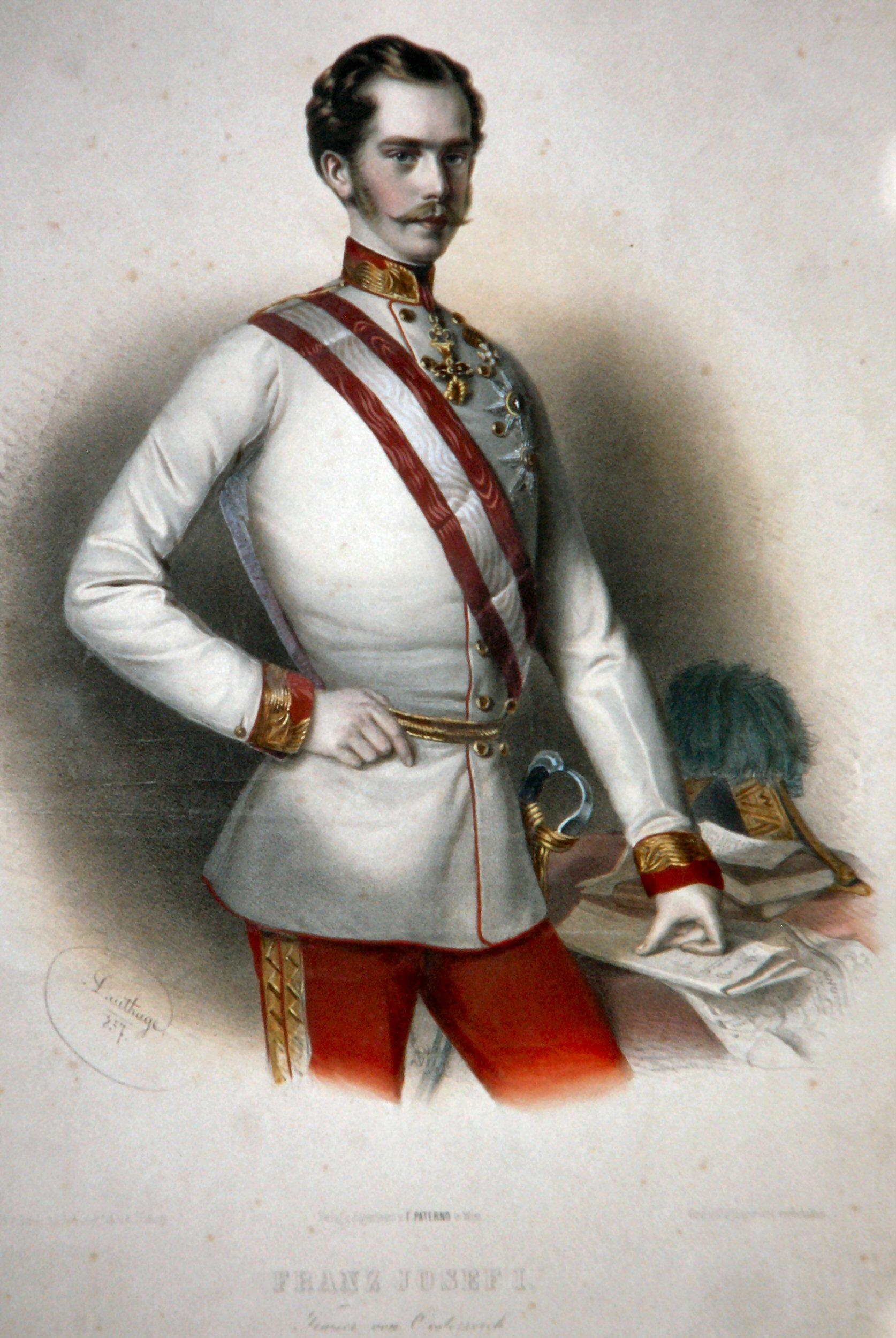 Franz Josef I. (1830-1916), Kaiser von Österreich, König von Ungarn etc. Lithographie von Adolf Dauthage, ca. 1860